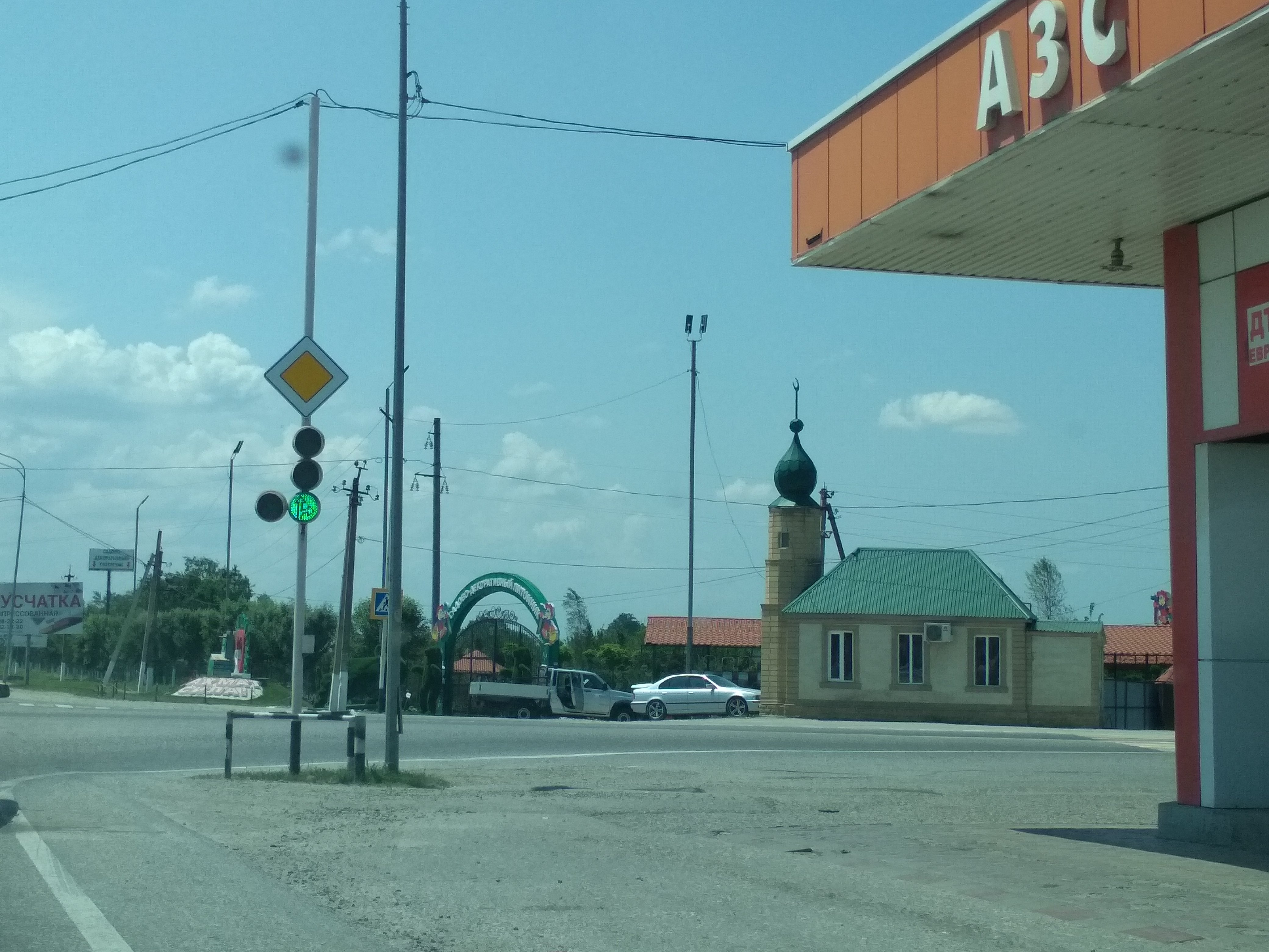 Нохчийн: Грозненский район, поворот на ст.петропавловскую